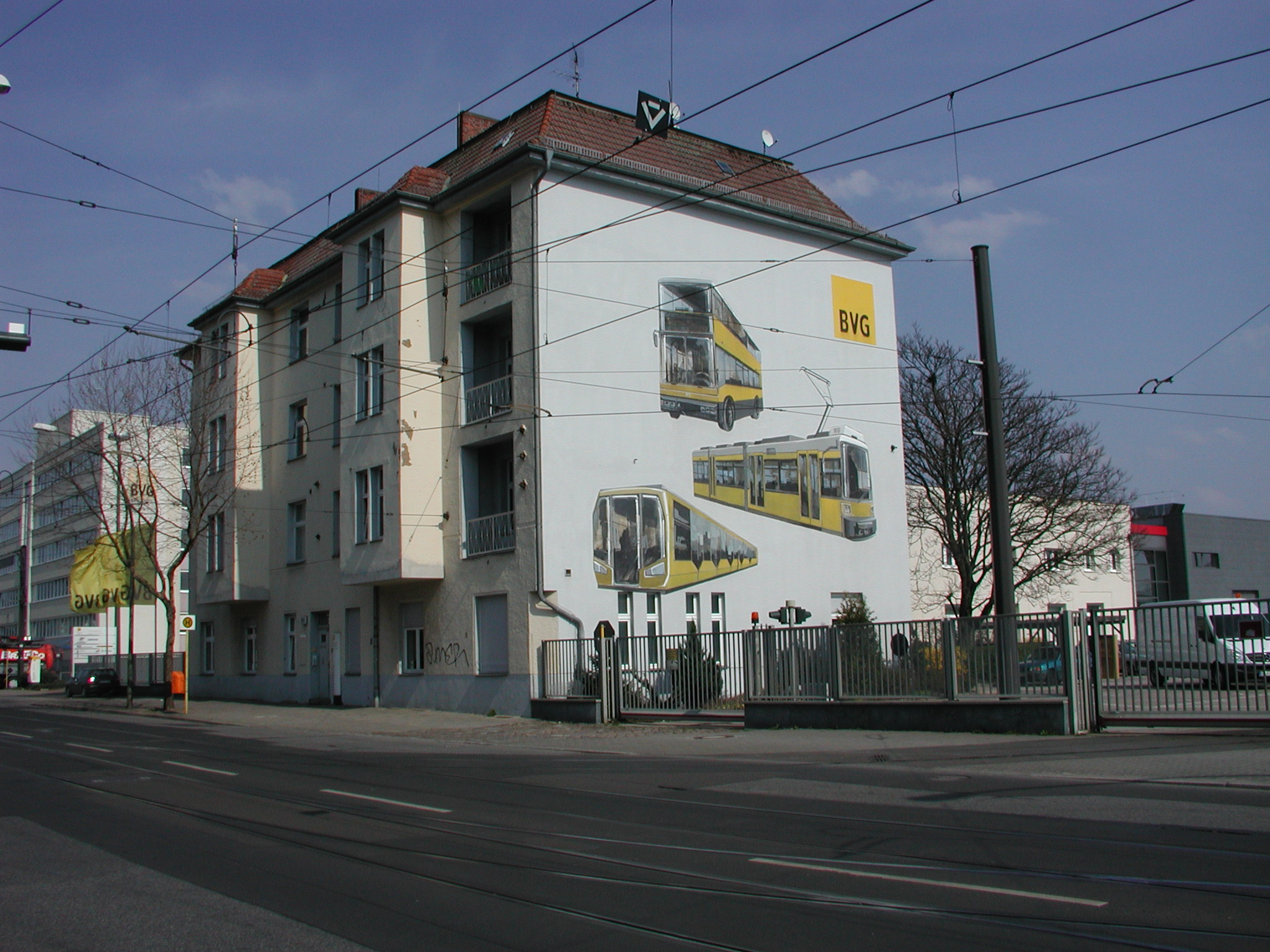 Straßenbahnhof Lichtenberg im Januar 2007 mit altem Verwaltungsgebäude und erneuertem Giebelbild